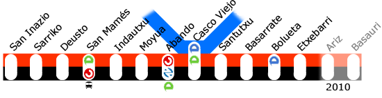 mapaTCmetro bilbao